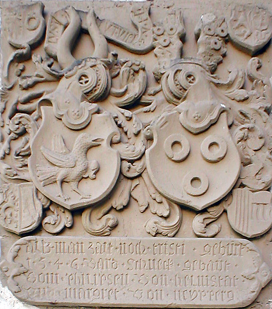 Wappen derer von Helmstadt (Schild mit Raben gekrönt von Helm mit Ochsenhörnern, links) und derer von Neipperg (rechts) am Alten Schloss Neckarbischofsheim.